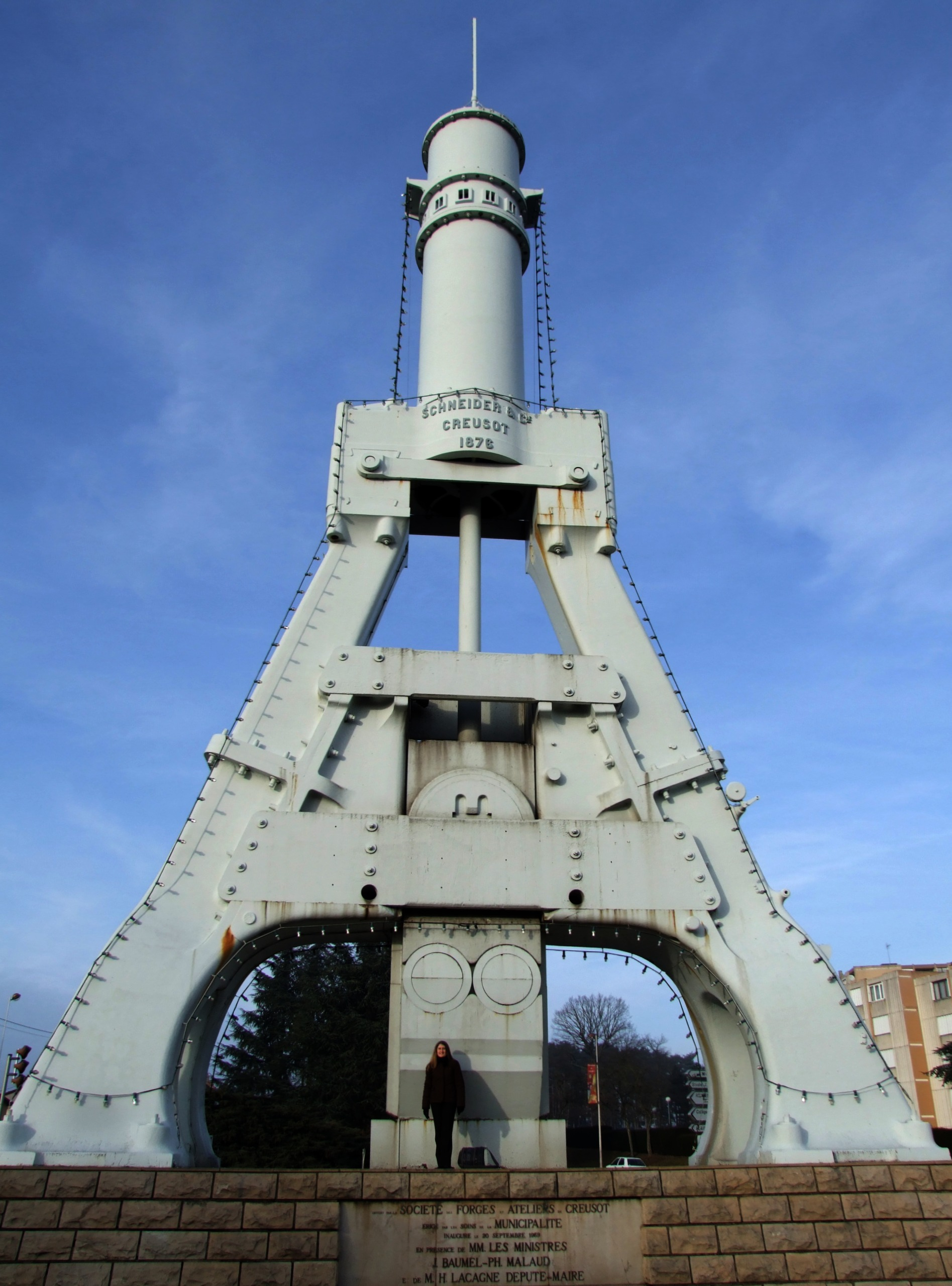 Marteau-Pilon du Creusot, Le Creusot, Saône-et-Loire, Bourgogne, FRANCE. La personne à côté du marteau permet de juger des proportions du dispositif.